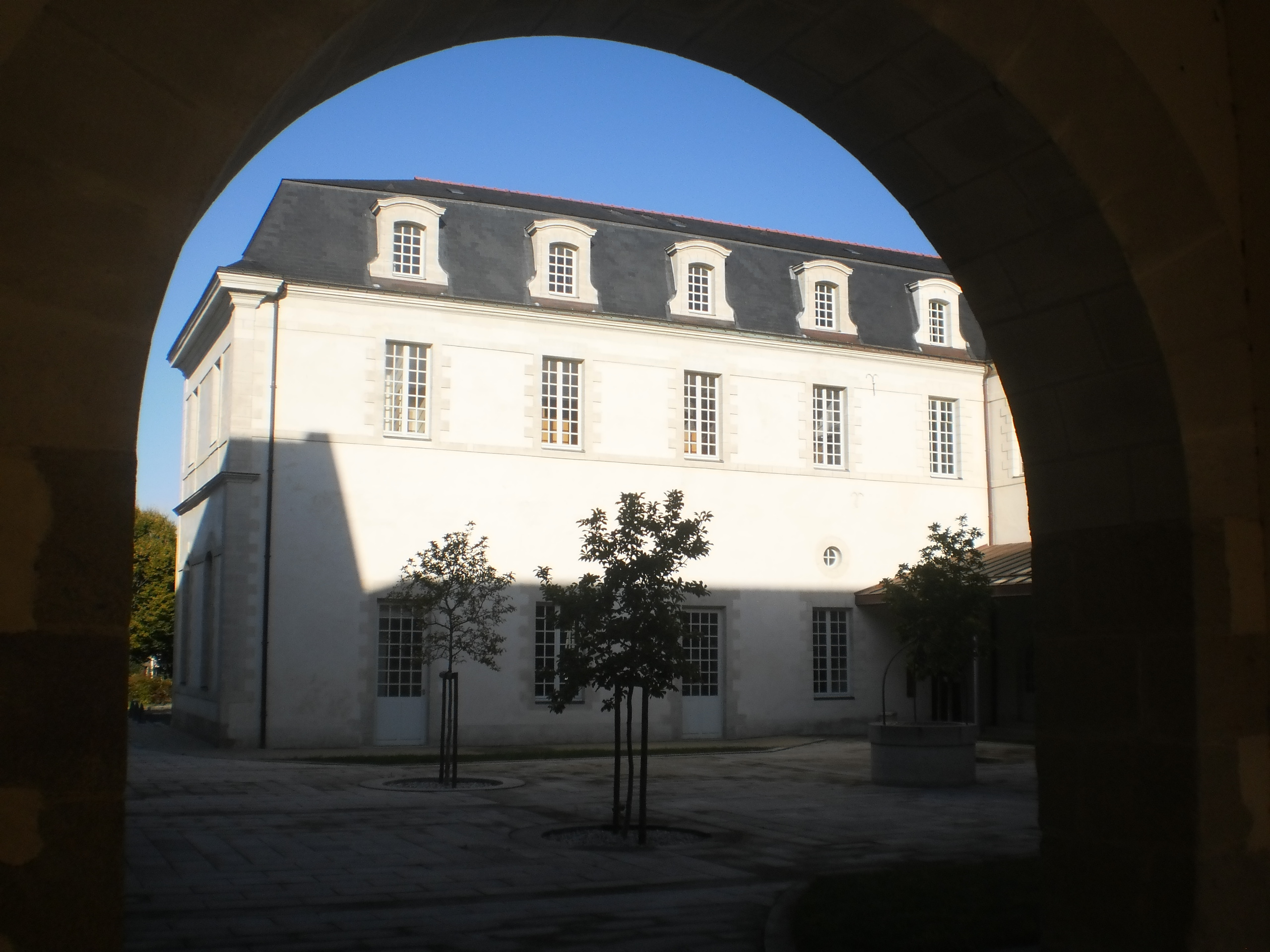 Vue de la cour de la Providence de l'hôpital Saint-Jacques de Nantes (France)